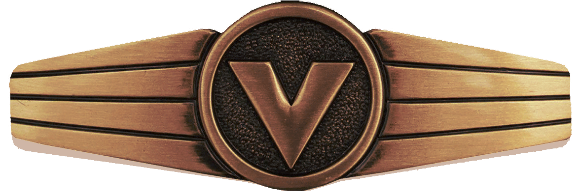 Tätigkeitsabzeichen für Versorgungs- und Nachschubpersonal der Bundeswehr Voraussetzungen: Stufe I, Bronze: Nach 6 Monaten Dienstzeit in fachbezogener Verwendung. Stufe II, Silber: Nach 5 Jahren fachbezogener Verwendung. Stufe III, Gold: Nach 10 Jahren fachbezogener Verwendung. Ausführung: Kreis mit stilisiertem Buchstaben „V“, beidseitig mit vier Streifen eingefasst, metallgeprägt; bronze-, silber- oder goldfarben.